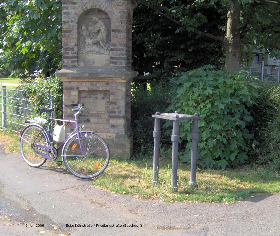 Basis Bonn, Punkt A, Ecke Kölnstraße/Friedlandstraße, Bonn-Buschdorf